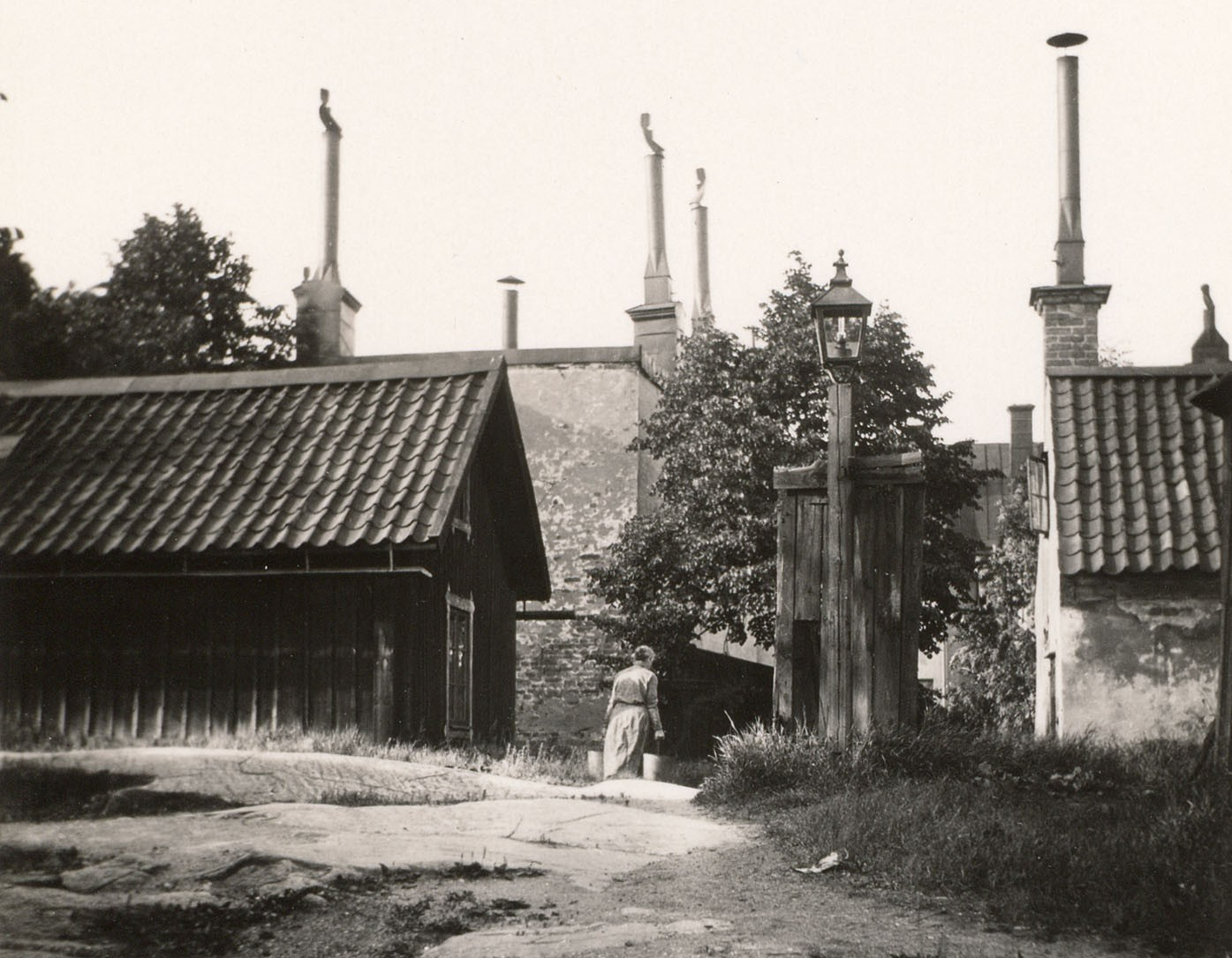 Kungsklippan på Kungsholmen i Stockholm omkring 1896